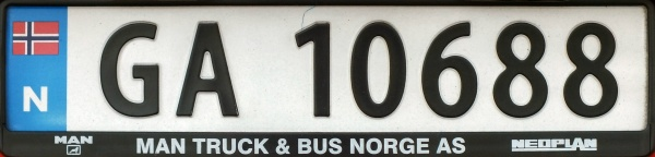 Skilt for gassdrevne kjøretøy